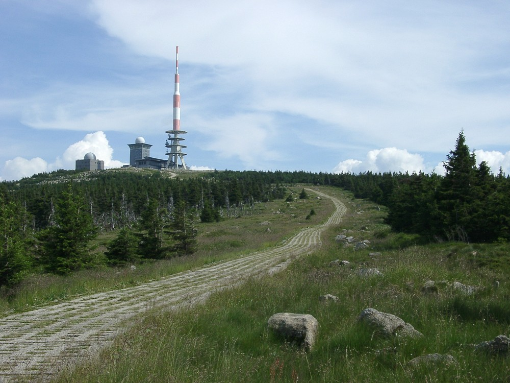 Blick zum Brocken